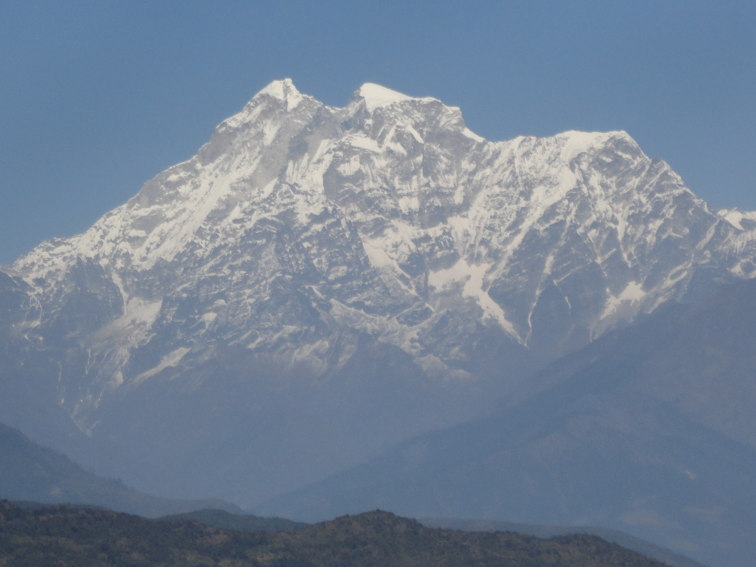 नेपाली: गौरीशंकर हिमाल जिलु को एक दृश्य